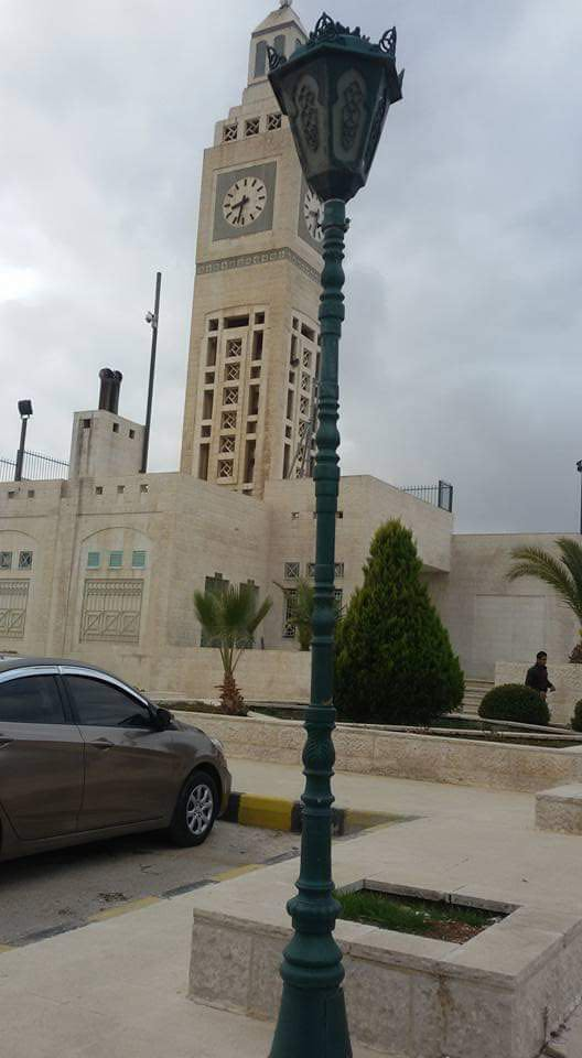 برج الساعة في جامعة الزيتونة الأردنية الخاصة في عمان عاصمة المملكة الأردنية الهاشمية